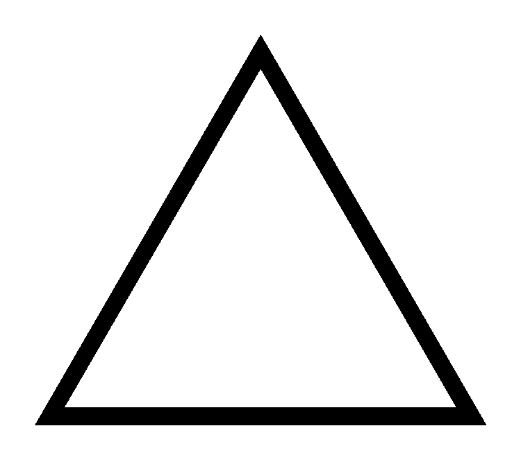 Triangle (Cyclopropane skeleton)